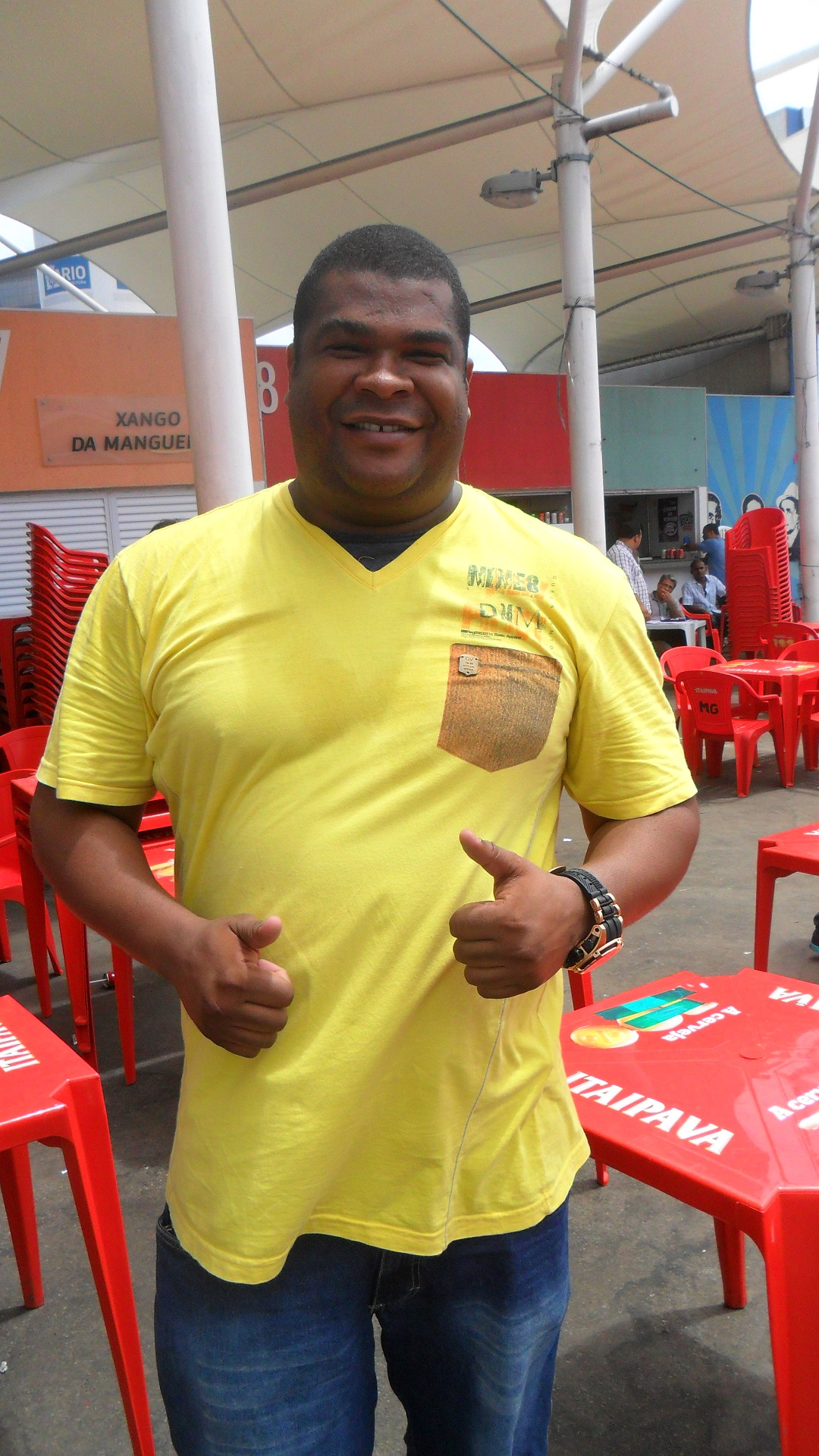 GRES Leão de Nova Iguaçu